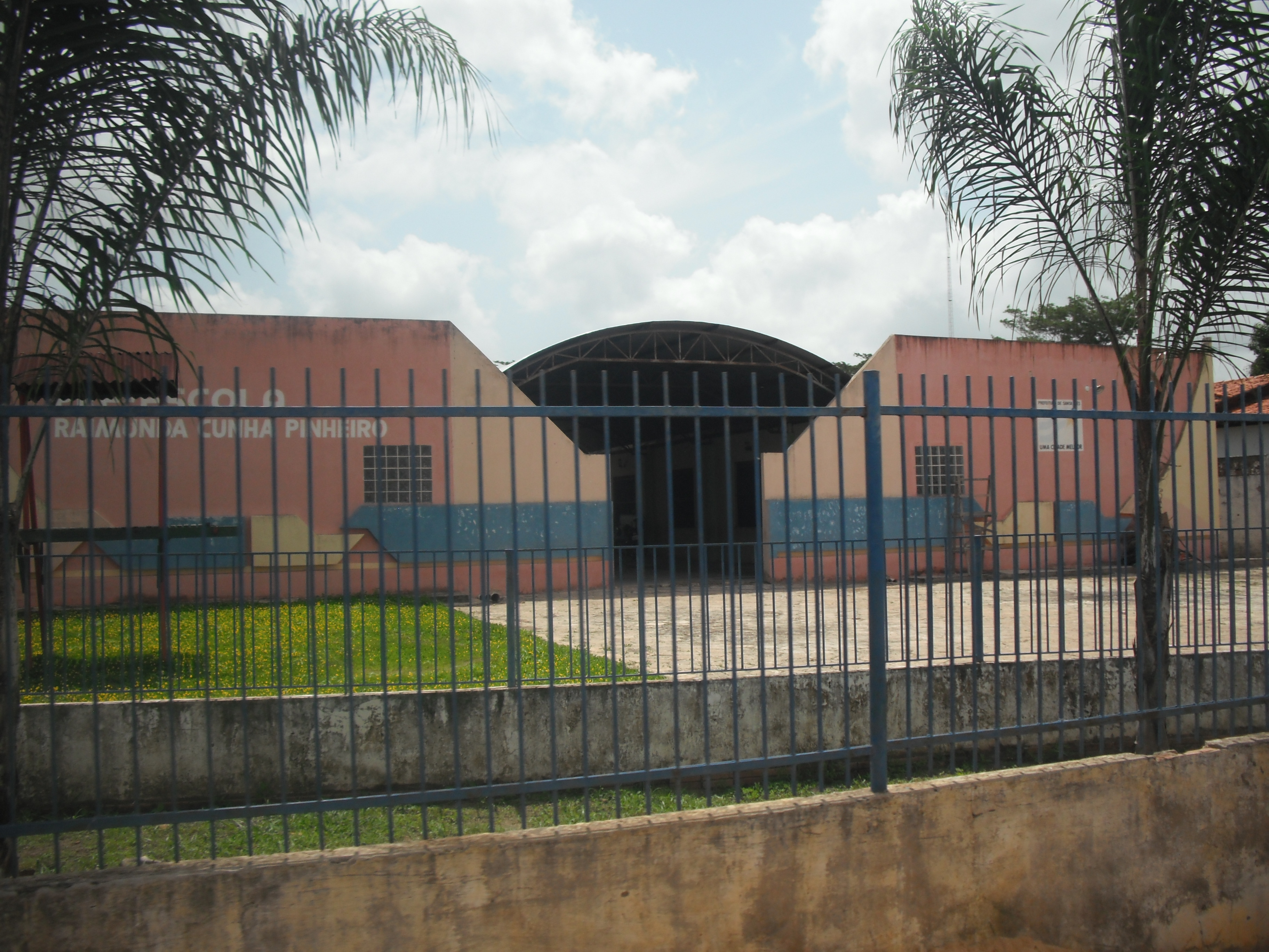 Cheche municipal